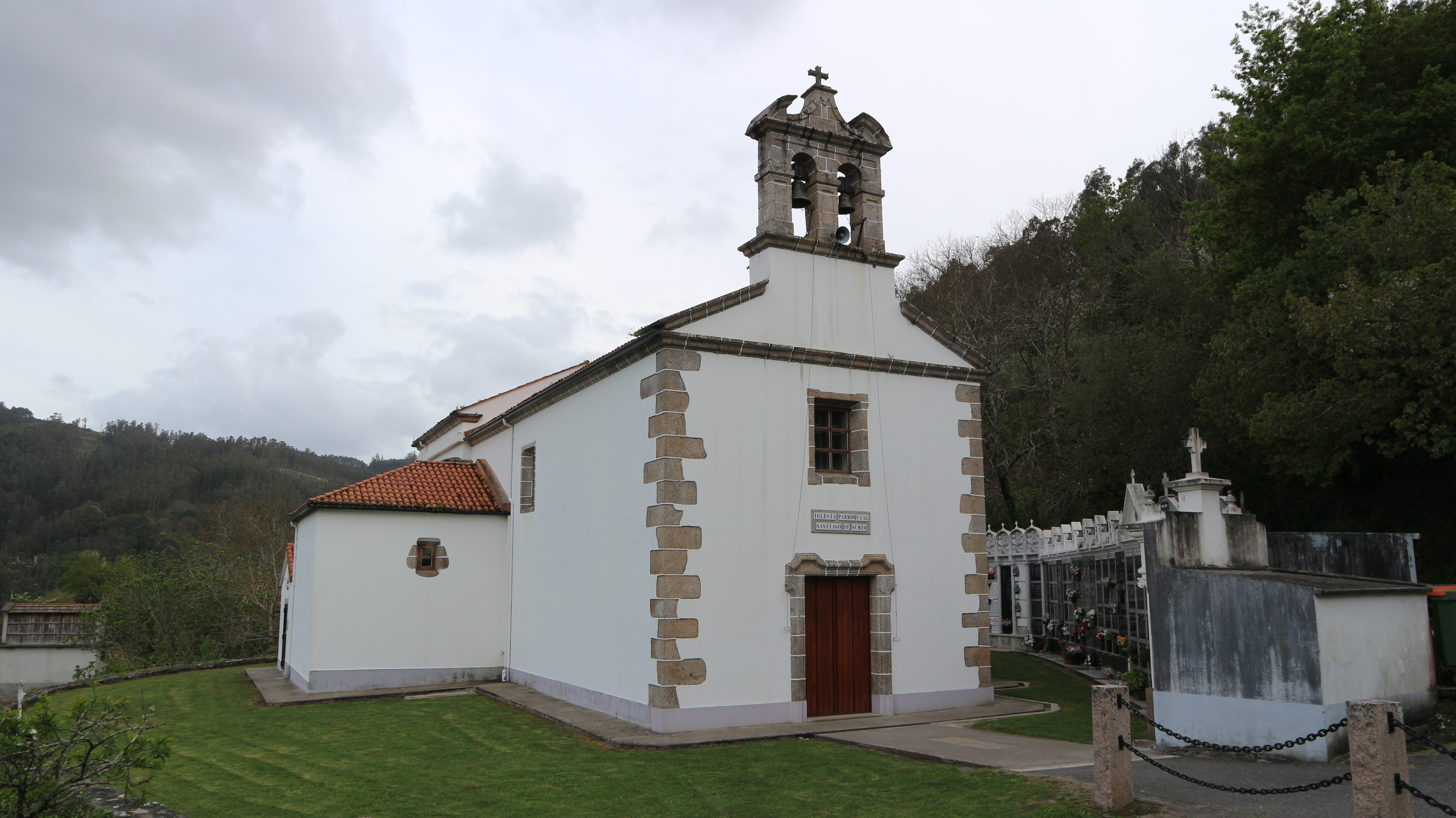 Igrexa de Santiago de Sumio. Souto Figueira, Sumio, Carral.